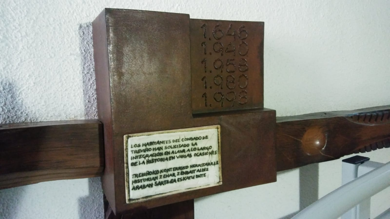 Trebiñuko auzia oroitzeko eskultura, Trebiñuko udaletxean dagoena